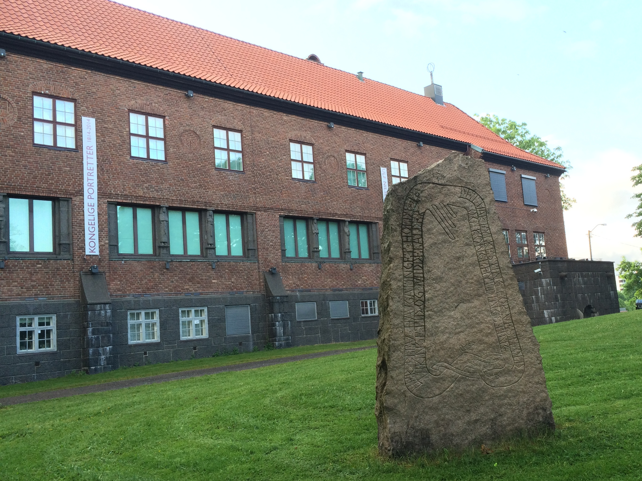 Haugar Vestfold Kunstmuseum i juni 2014. Bygningen ble bygd 1918–1921 som Tønsberg navigasjonsskole (Tønsberg sjømandsskole) på Haugar/Møllebakken i Tønsberg i Vestfold. Arkitekter: Andreas Bjercke og Georg Eliassen. Utsmykning: Tolv karyatider av Wilhelm Rasmussen 1920-1922. Minnebauta over Haugarting - Haugar. A.H. Bjercke og G. Eliassen: «Her blev haugatinget holdt i vikingetid og middelalder. Det var fylkesting for Vestfold og kongehyldningsting.»